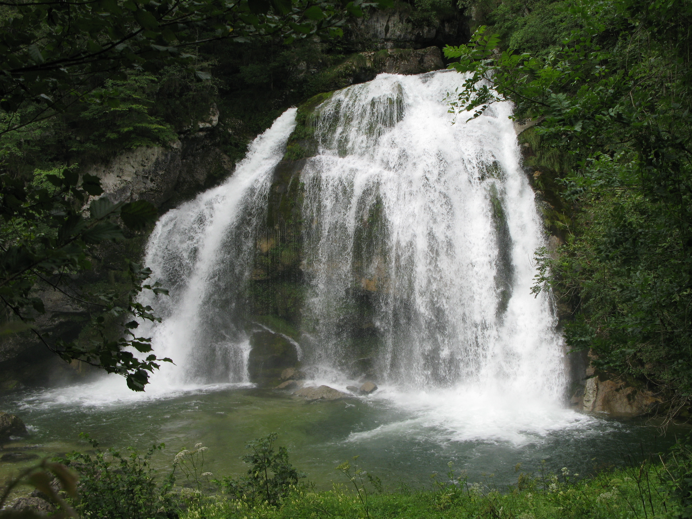 Slap Virje je pritok Glijuna, ta pa Soče pod Bovcem